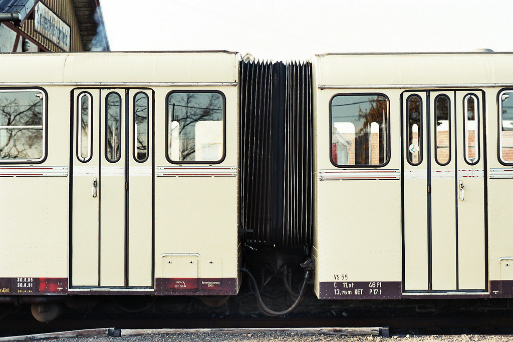 Faltenbalgübergang zwischen VT 54 und VS 55 der Hersfelder Eisenbahn